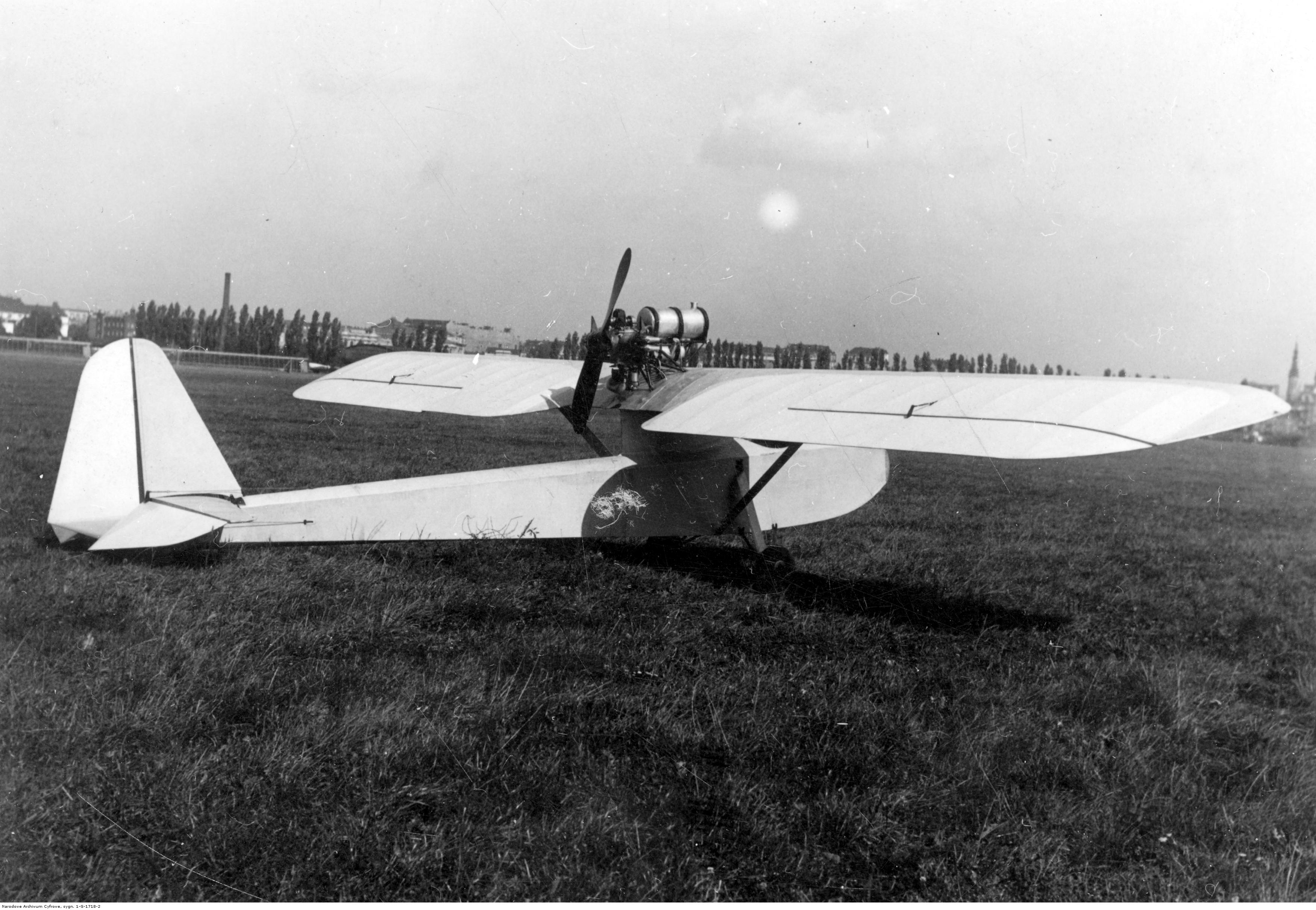 Motoszybowiec AMA